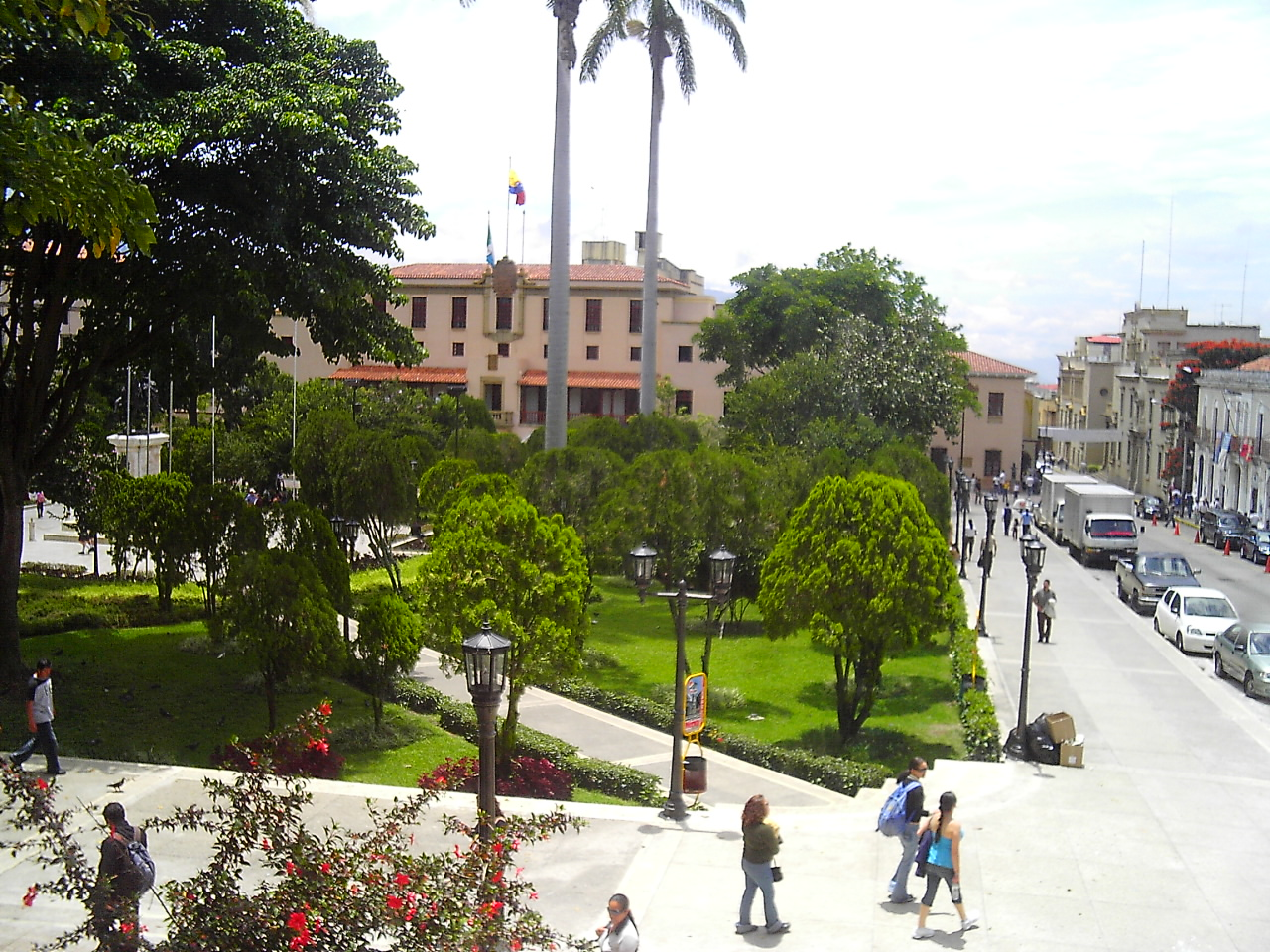 Plaza Bolívar de Mérida desde la Esq. de la 22 con Av 3.